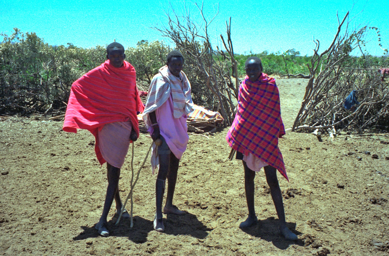 Maasai men, Masai Mara, Kenya, 1993.1993 #155-35A Masai Mara